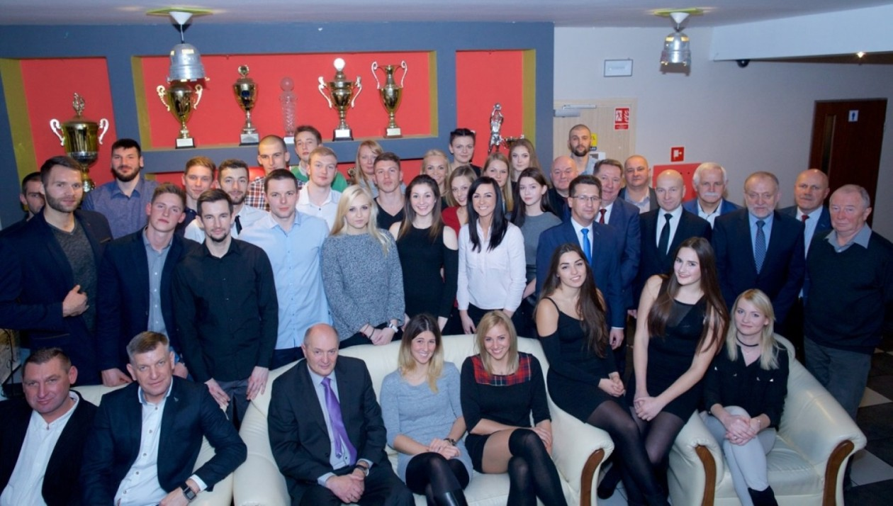 Stargard, 2017r. Spójnia Stargard - świąteczne spotkanie siatkarek i koszykarzy